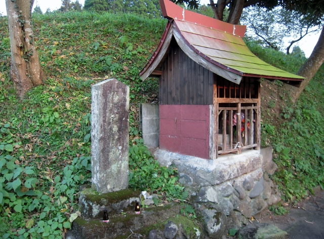 熊本県球磨郡相良村柳瀬にある、かくれ念仏の里 十島仏像仏具焼却地